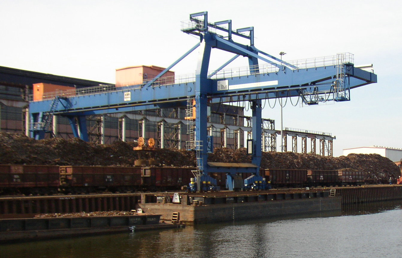 Schubleichter